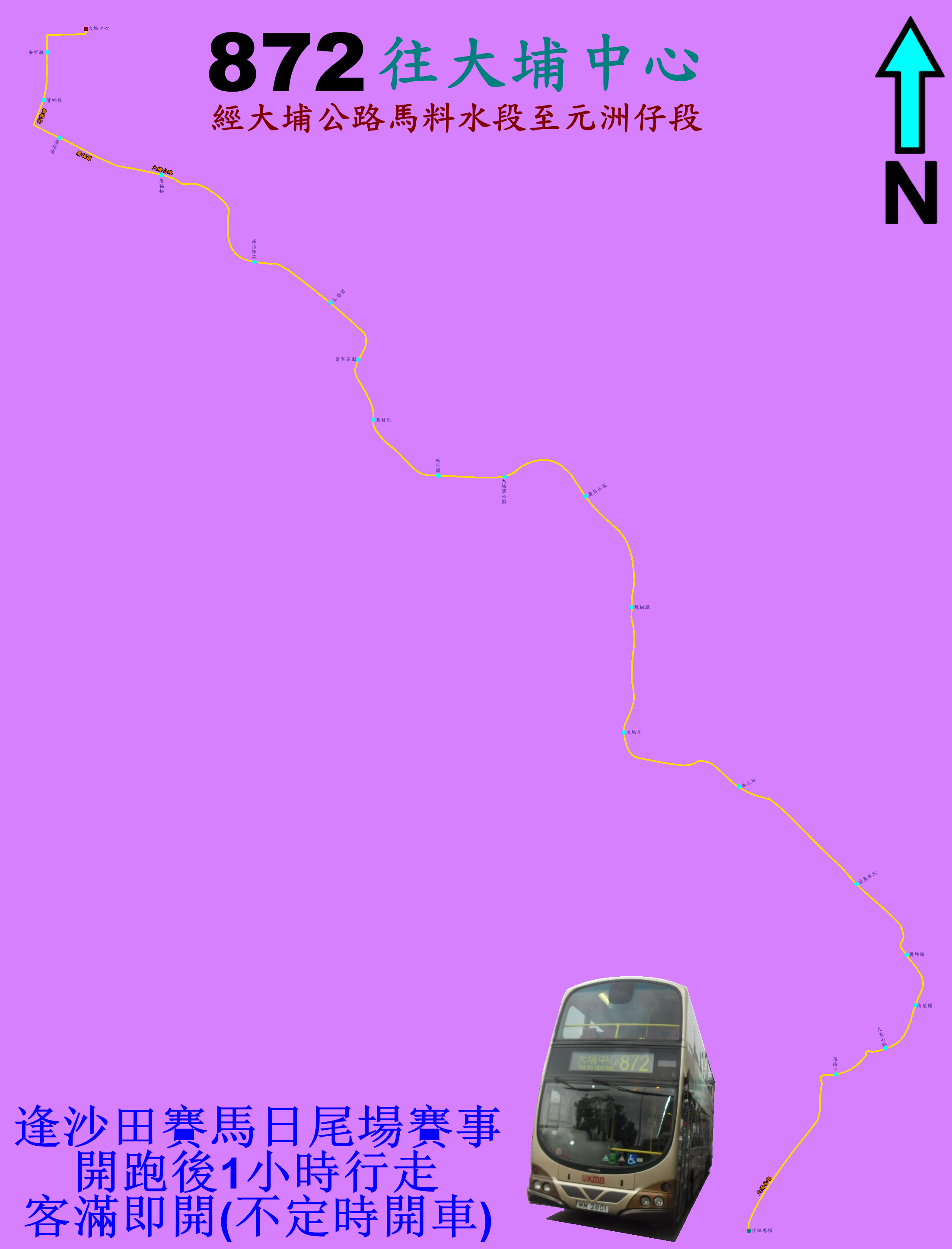 中文（香港）: 馬場巴士872線的走線圖